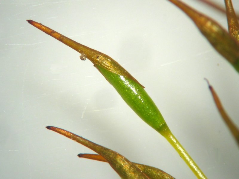 Mauer-Drehzahnmoos (Tortula muralis), Kalyptra, Vergrößerung: 30x